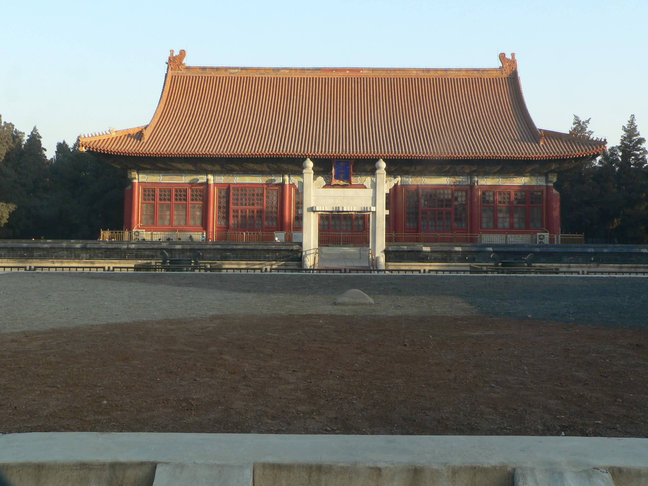 北京中山公园 社稷坛（五色土）